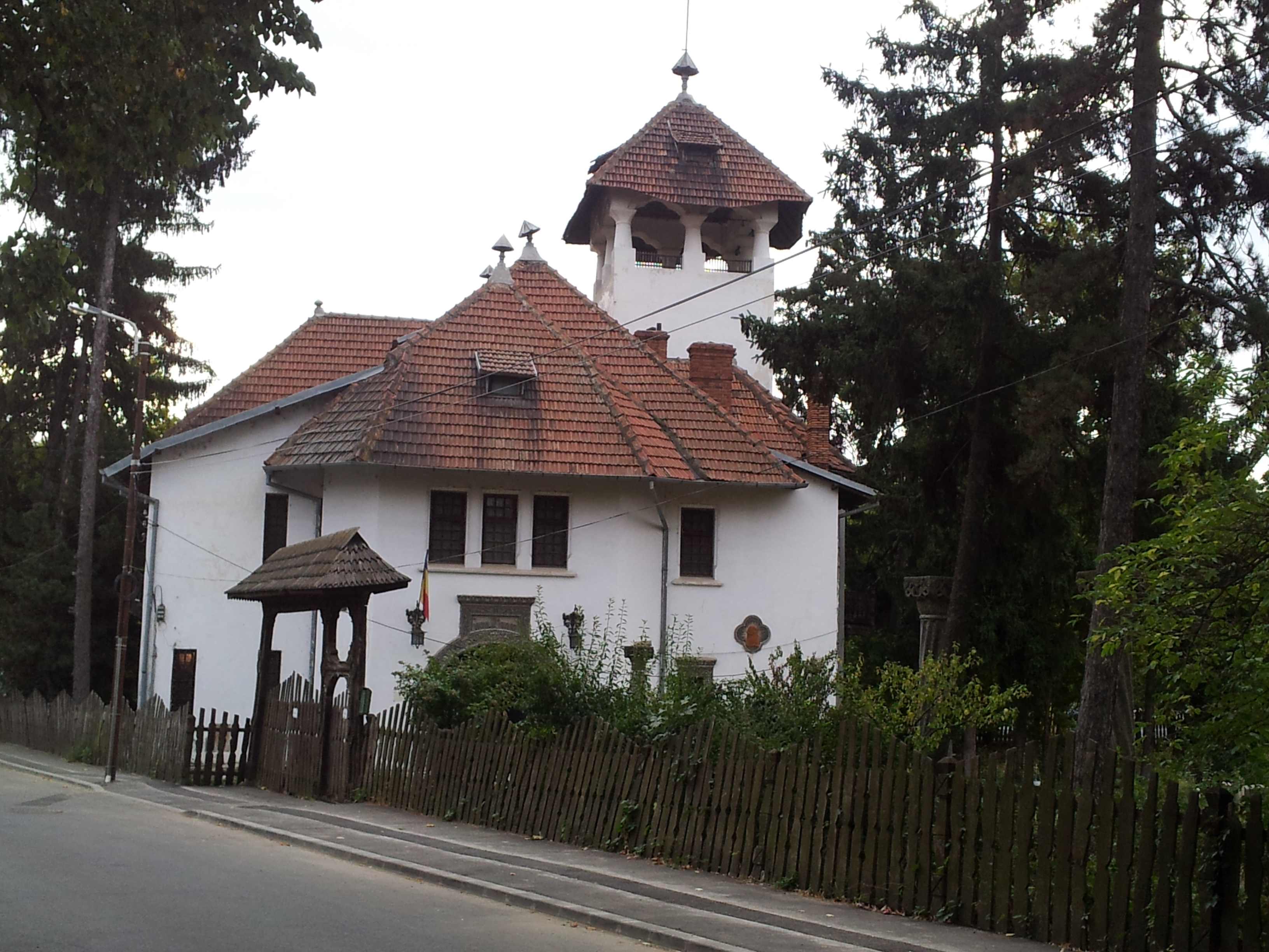 Vila Dr Minovici Minovici B-II-m-A-19206